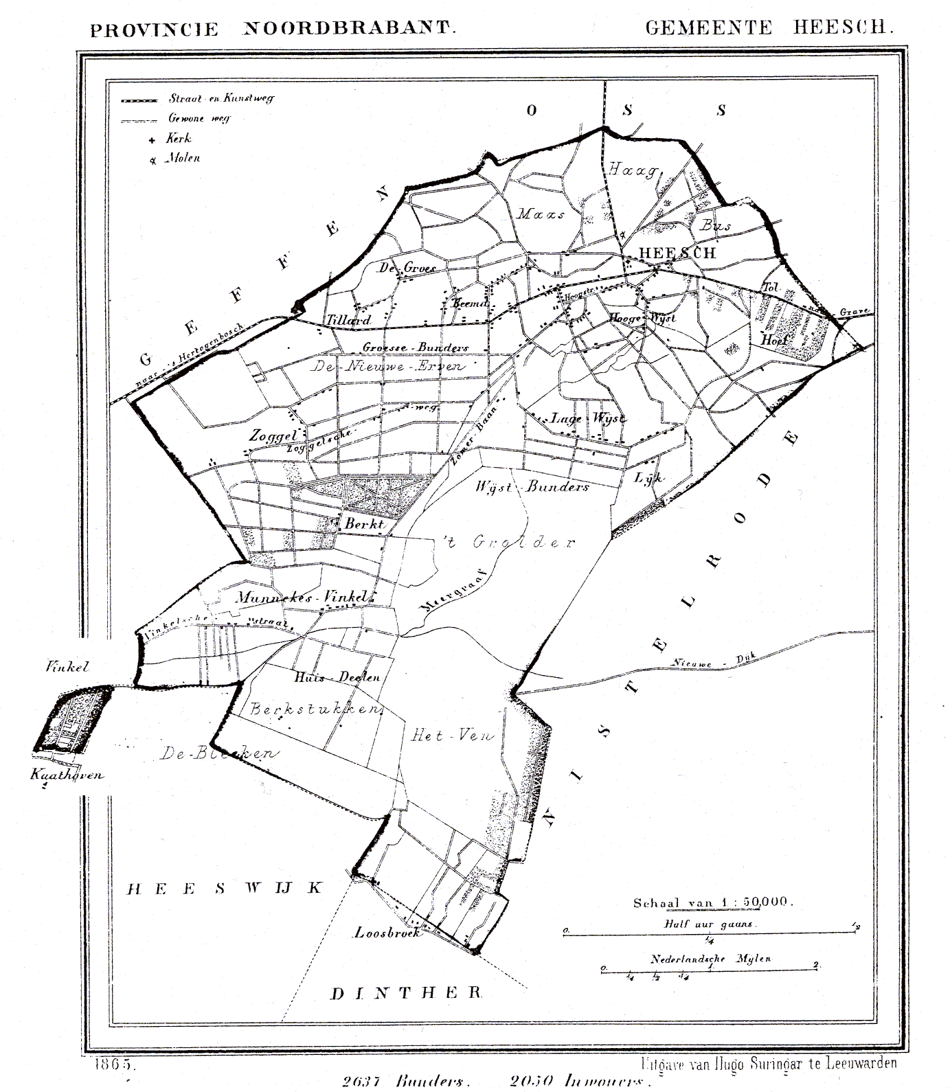 Nederland, Noord-Brabant, Gemeente Heesch